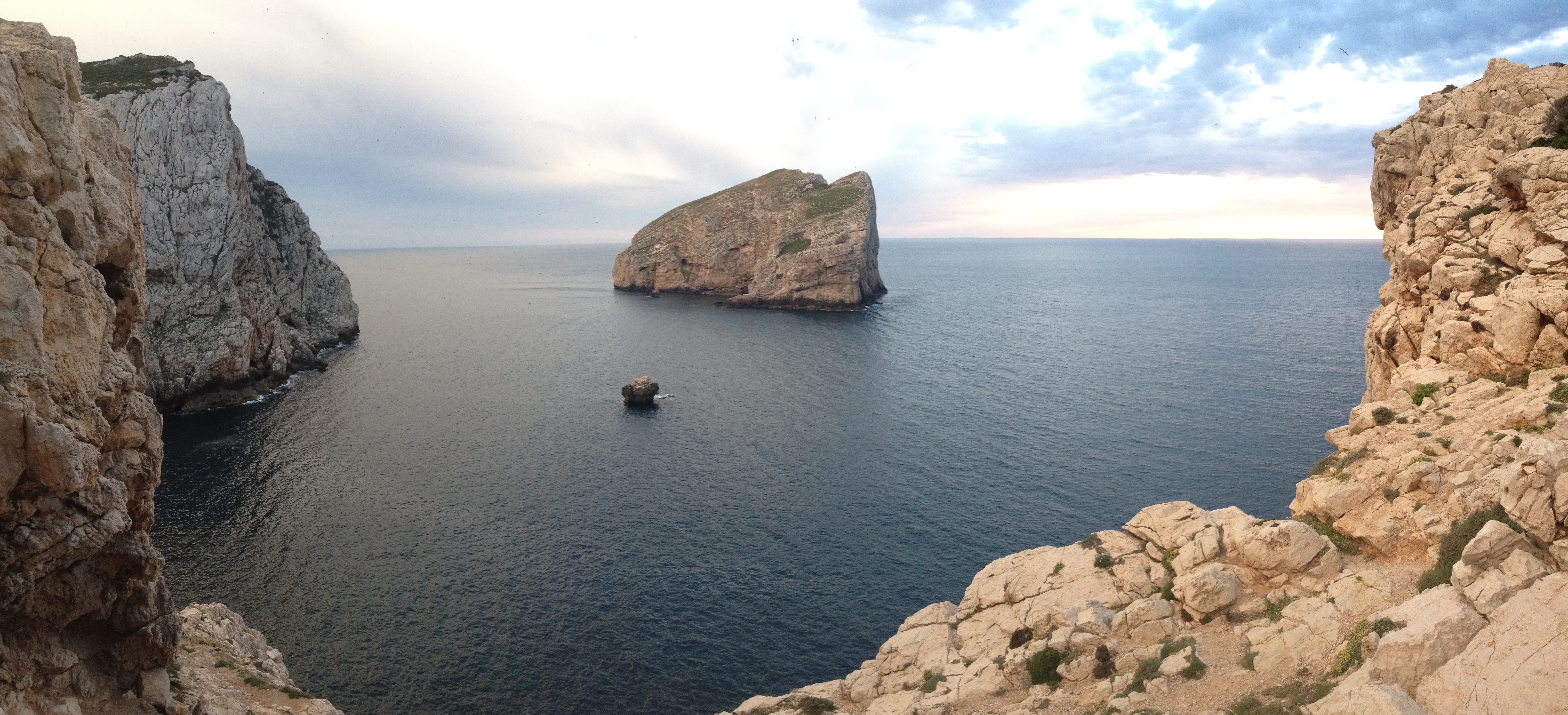 Panoramica do Capo Caccia